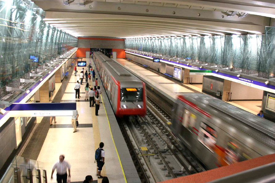 Foto del Metro de Santiago